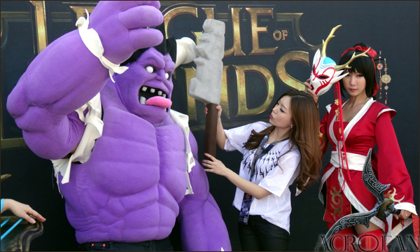 롤드컵 행사장 찾은 레이디 제인